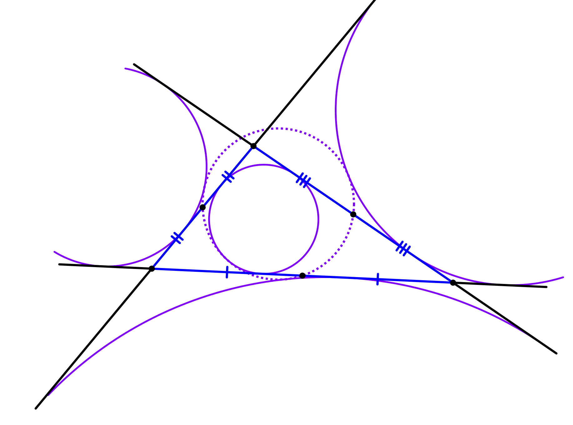 фейербах